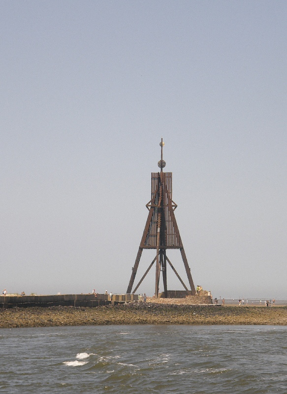 Bilder aus Cuxhaven